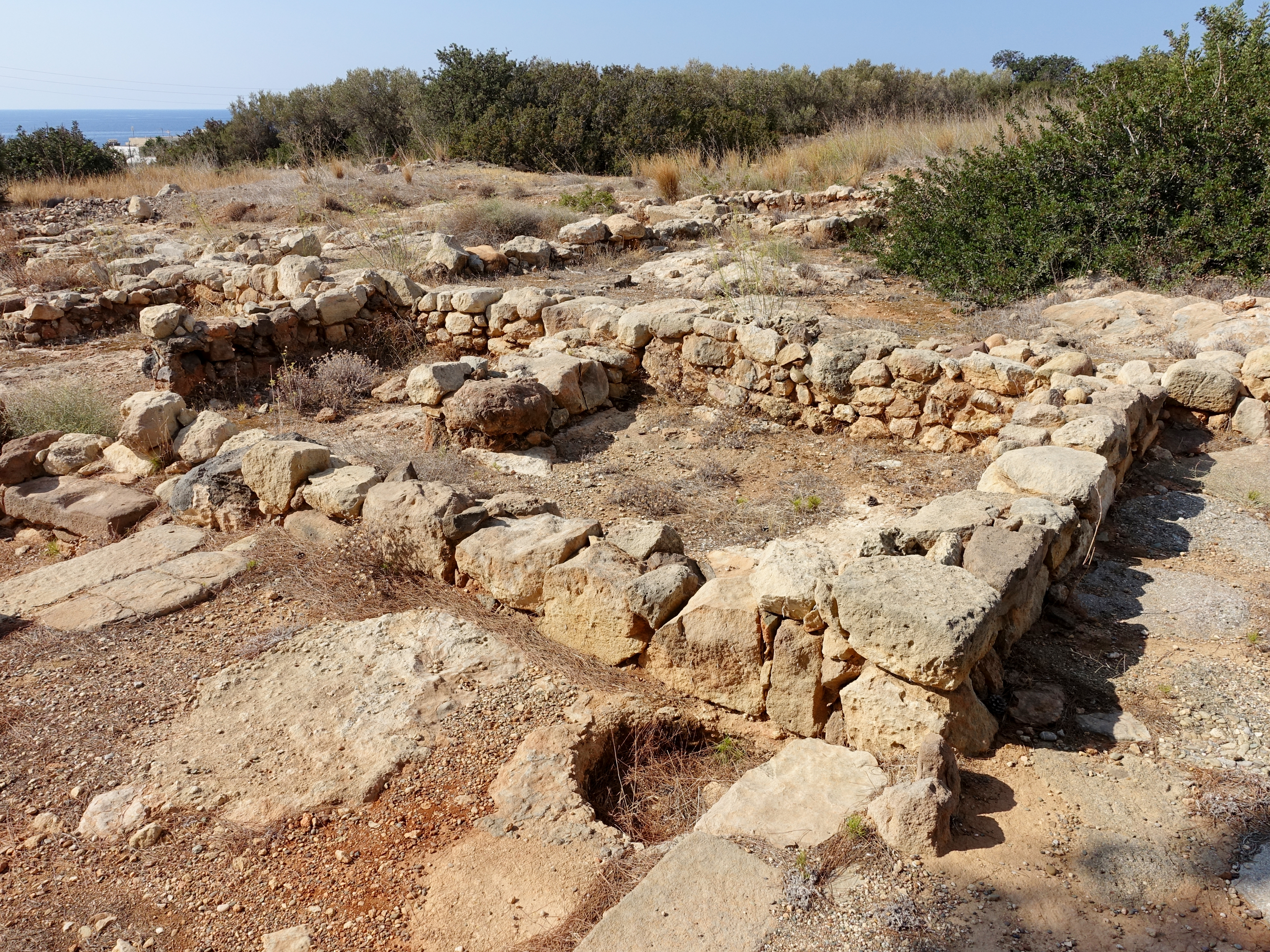 Ausgrabungsstätte der minoischen Villa von Makrygialos, Kreta, Griechenland